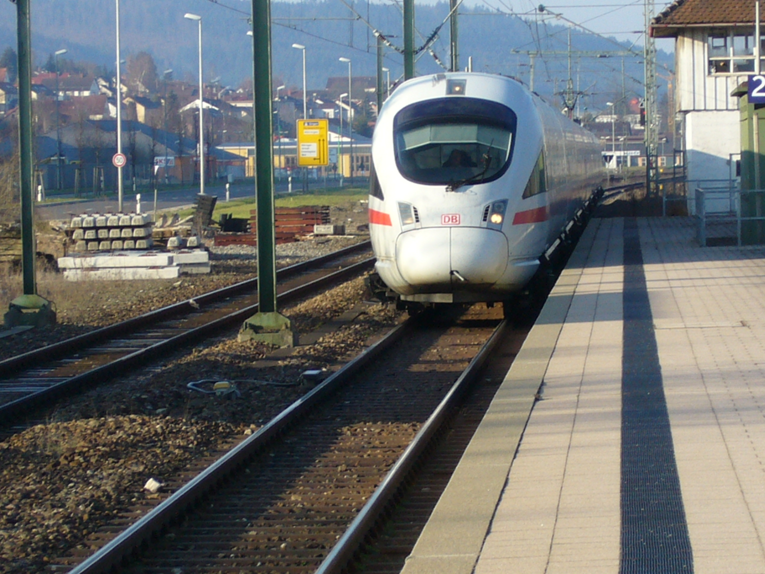 InterCityExpress (Baureihe 411, ICE-T) im Bahnhof Tuttlingen